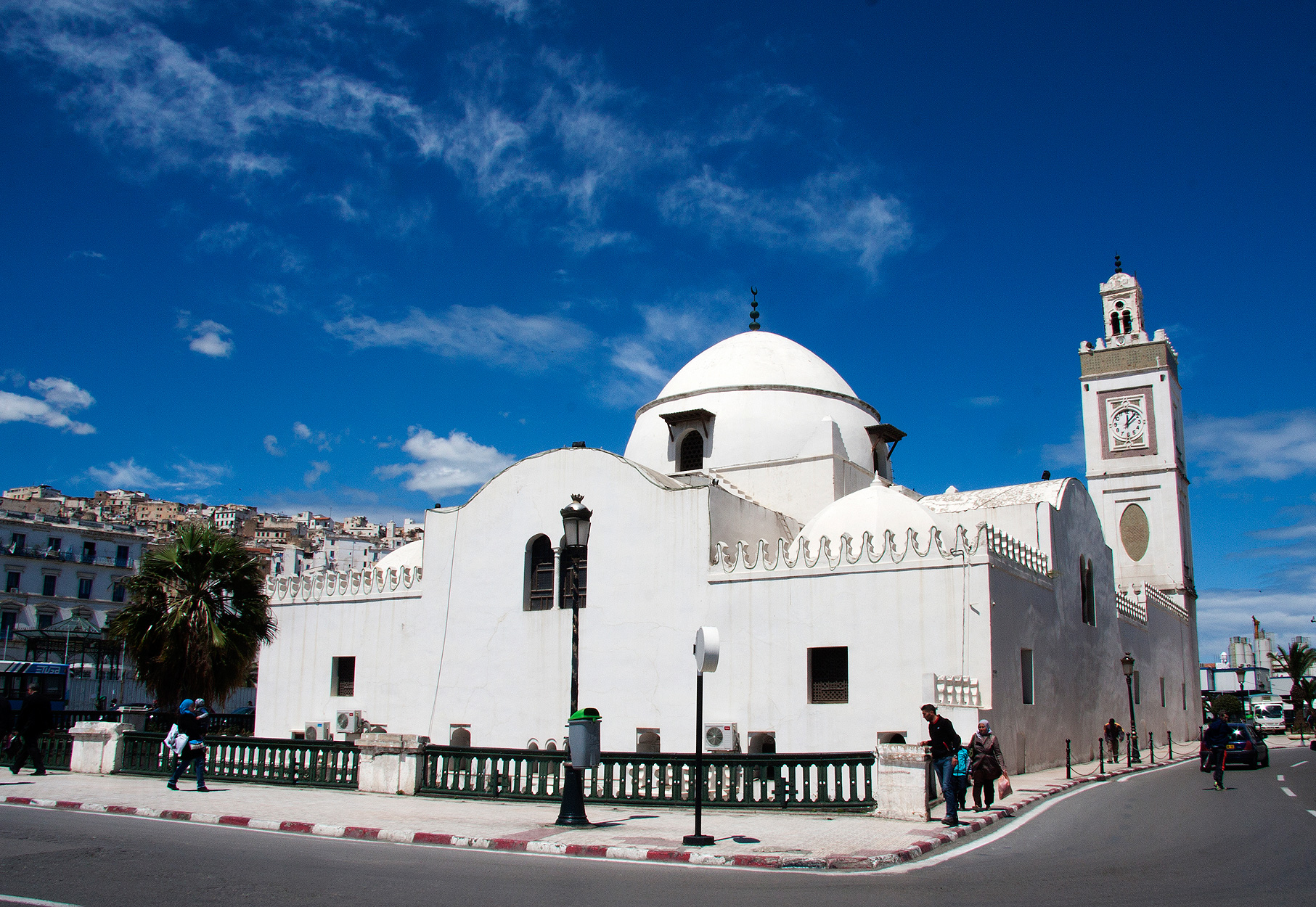 أحد أقدم المساجد في العاصمة الجزائرية